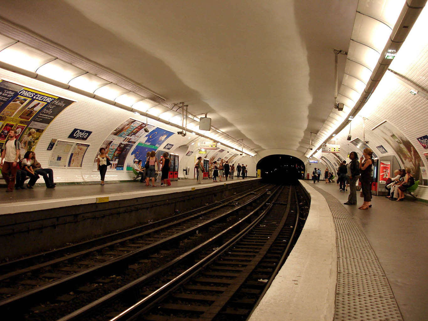 Station Opéra, de la ligne 7 du métro de Paris, France.